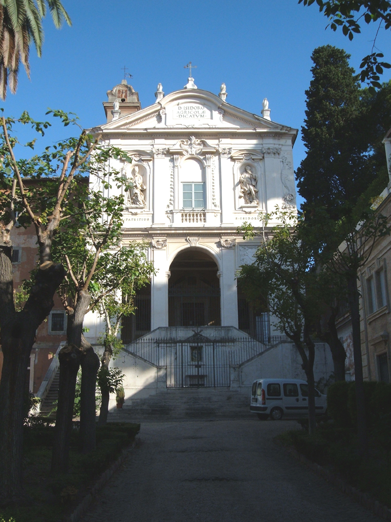 Chiesa di Sant'Isidoro a Capo le Case, a Roma, nel rione Ludovisi.